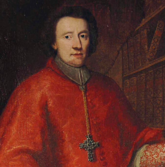 Kardinaal d'Alsace, aartsbisschop van Mechelen